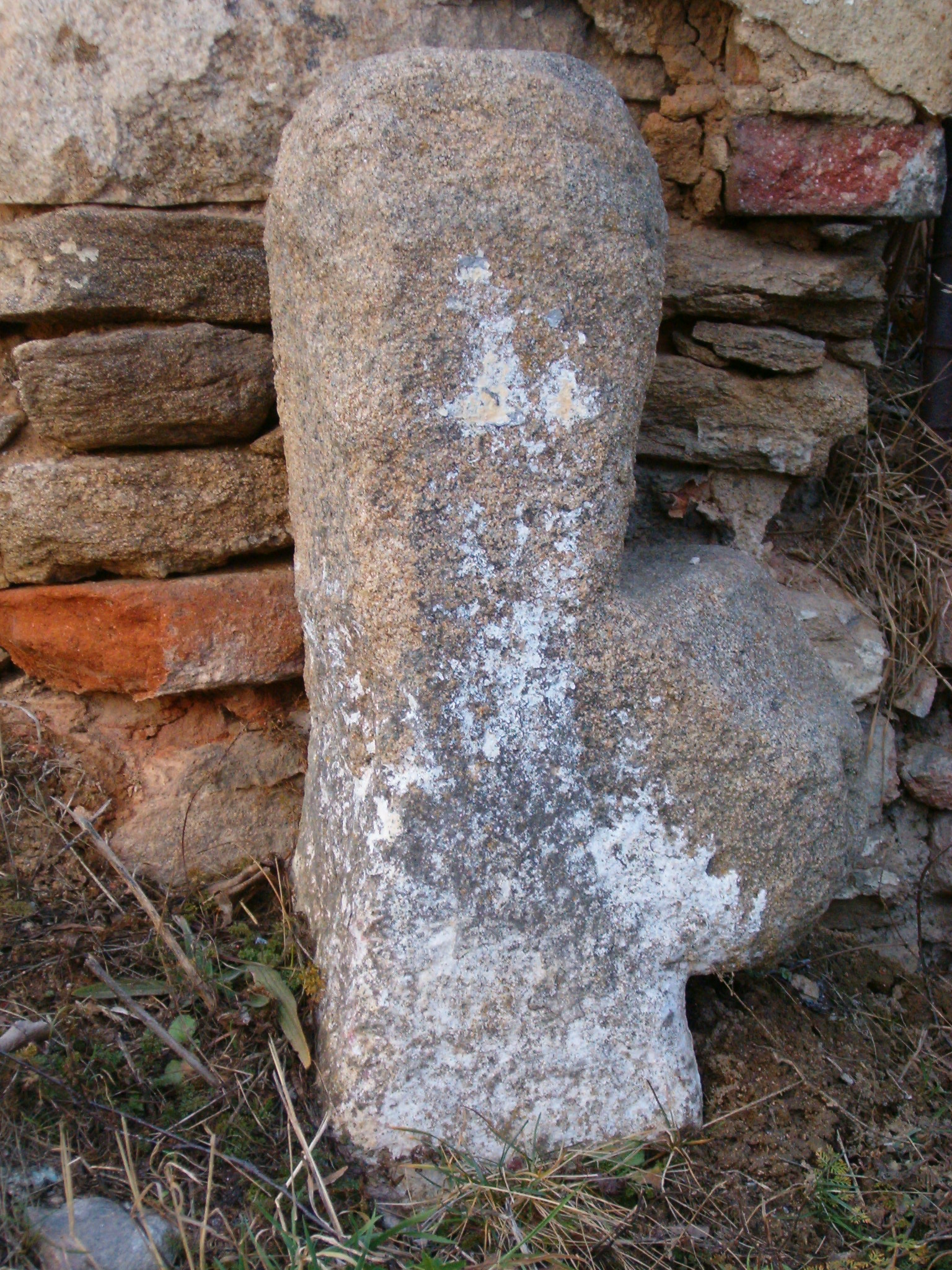 Smírčí kříž. Olešná. Okres Písek. Česká republika.